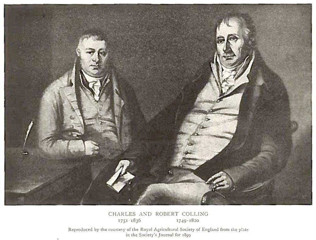 Reproduced by the courtesy of Royal Agricultural Society of England from the plate in the Society`s Journal for 1899.